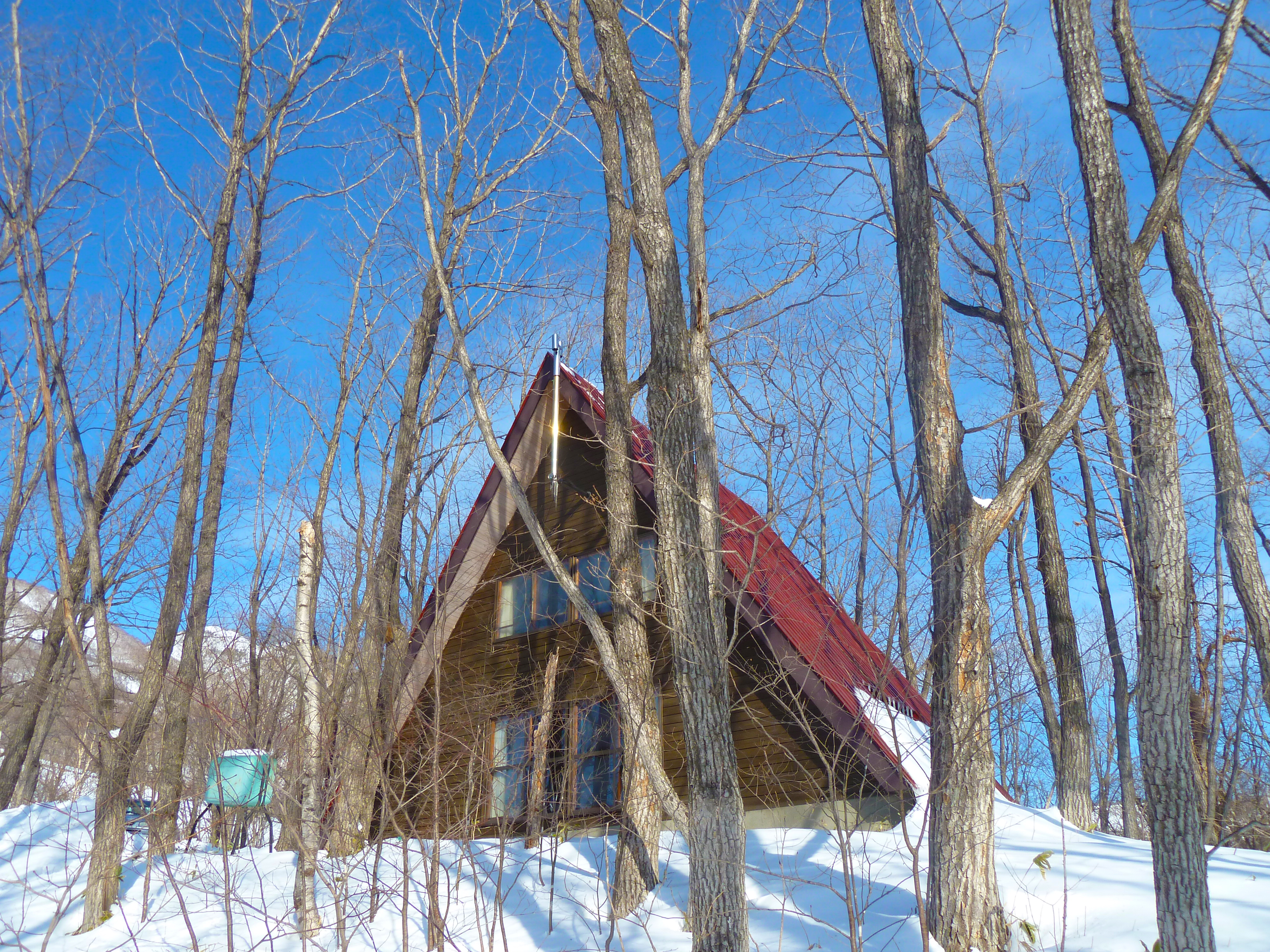 2010-10-17 撮影